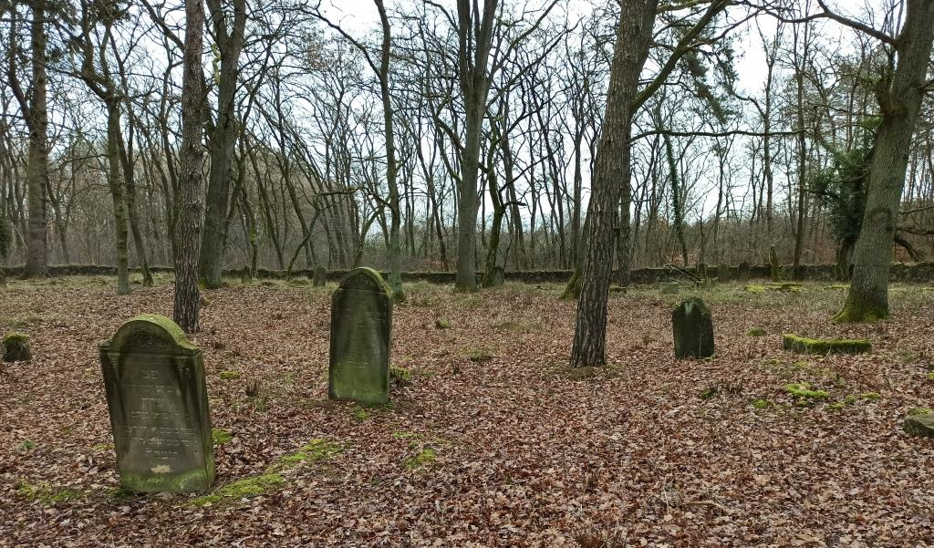 Cmentarz żydowski w Trzemesznie Lubuskim ruiny 2020